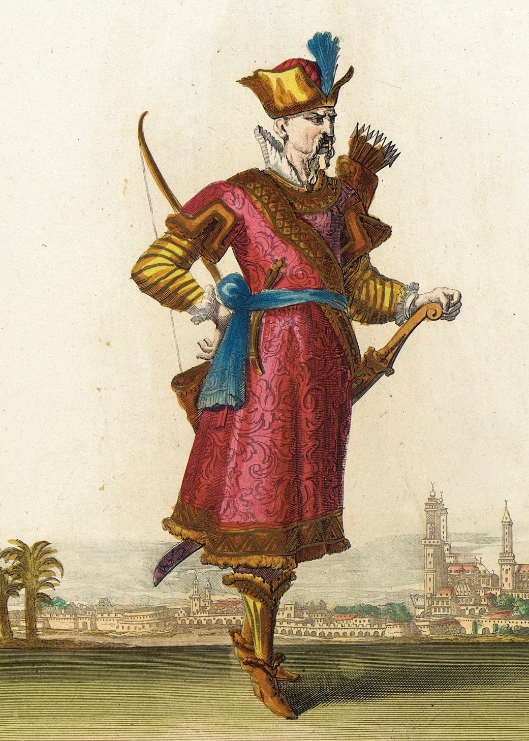 Jean Bérain père (1640 – 1711), d’après Jacques Lepautre (après 1653 – 1684): Recueil des modes de la cour de France, Habit d'Arabe, ca. 1682. Los Angeles County Museum of Art. Détail.